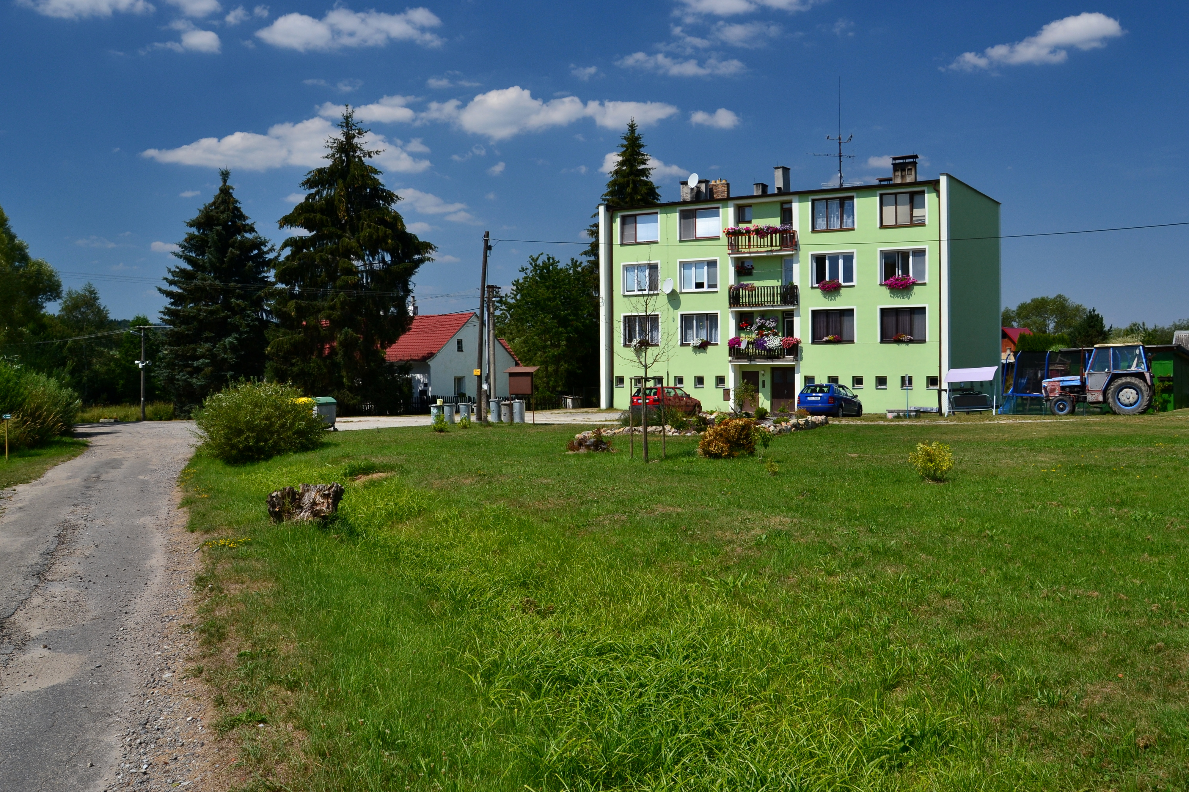 Centrum vesnice